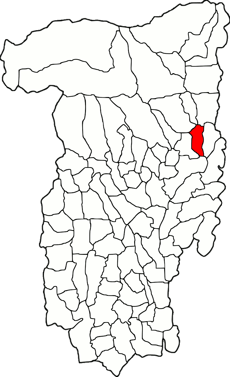 Lage der Gemeinde Dăești im Kreis Vâlcea (RO).